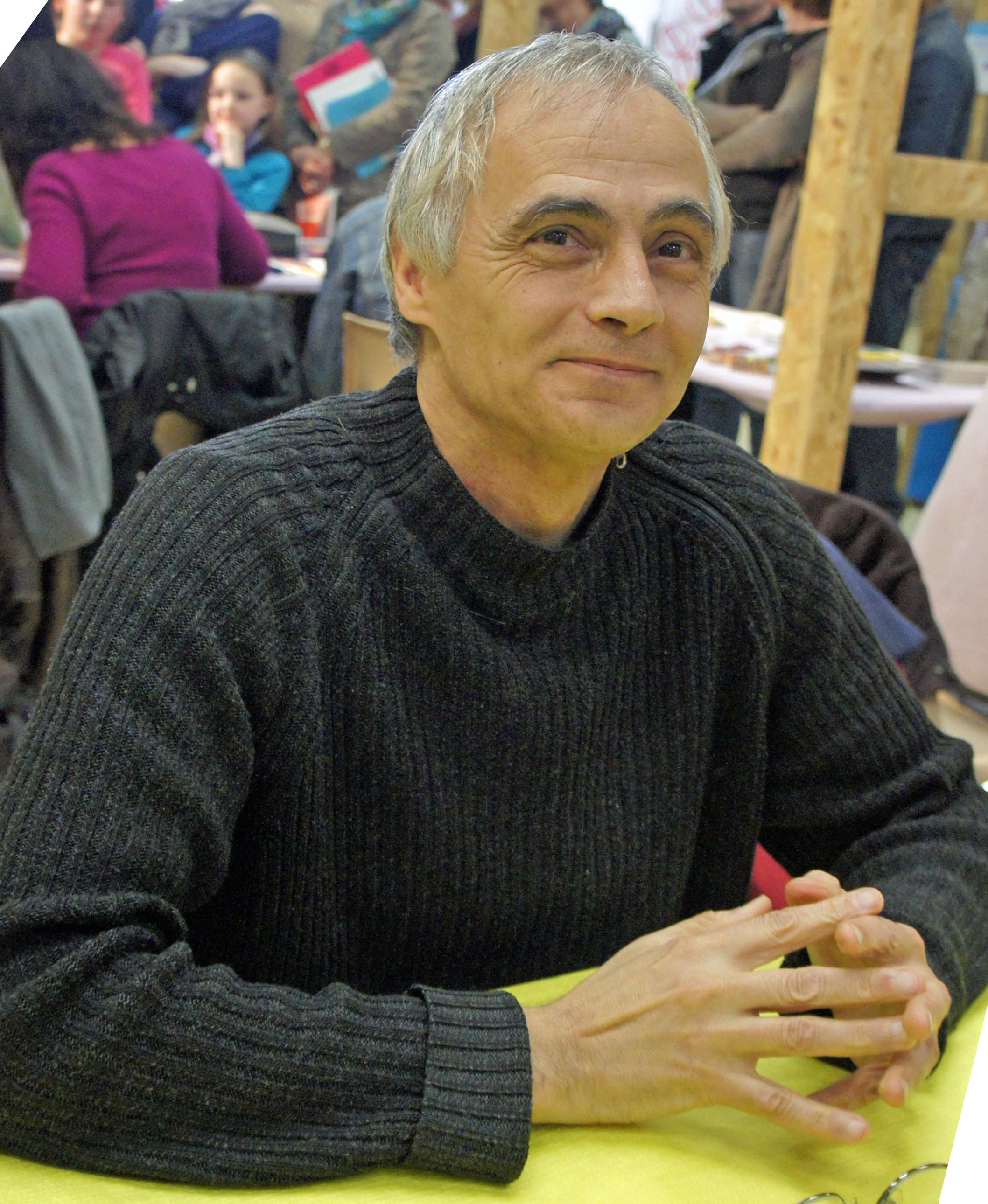 Michel_Piquemal_au 7e_salon_du_livre_de_jeunesse_de Cormontreuil.